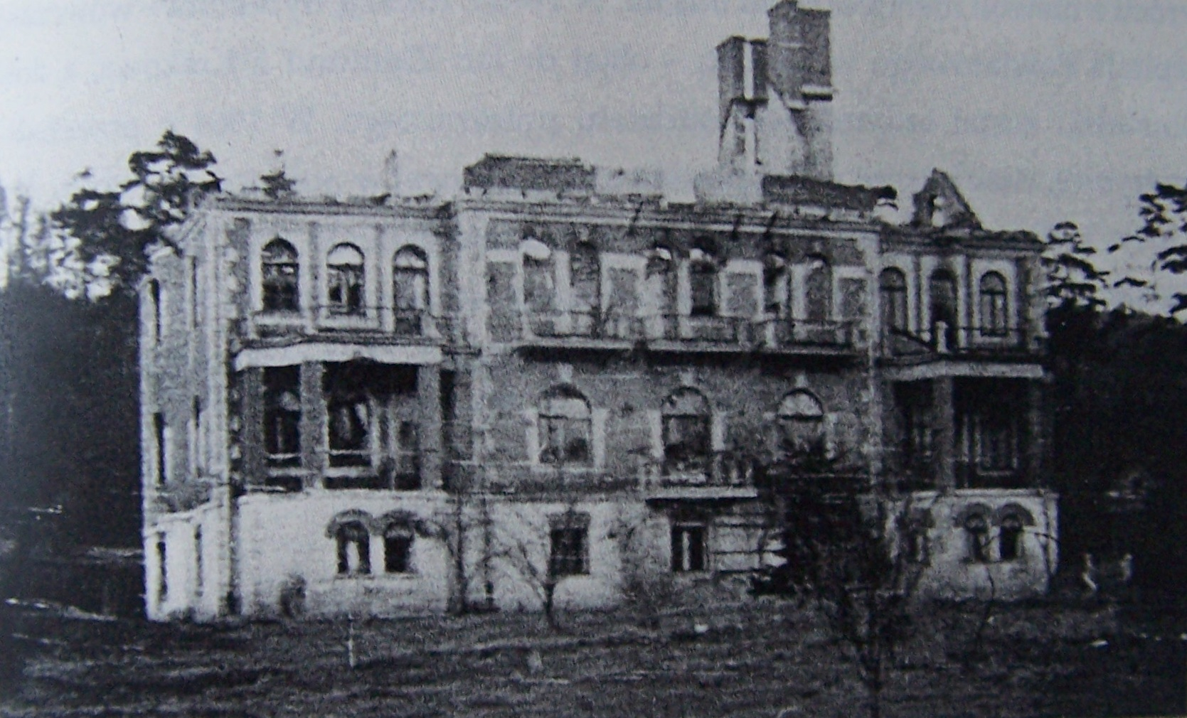 Sanatorium dra Stanisława Domańskiego wybudowane w latach 1927-1930 przy ulicy Gajowej w Sanoku.